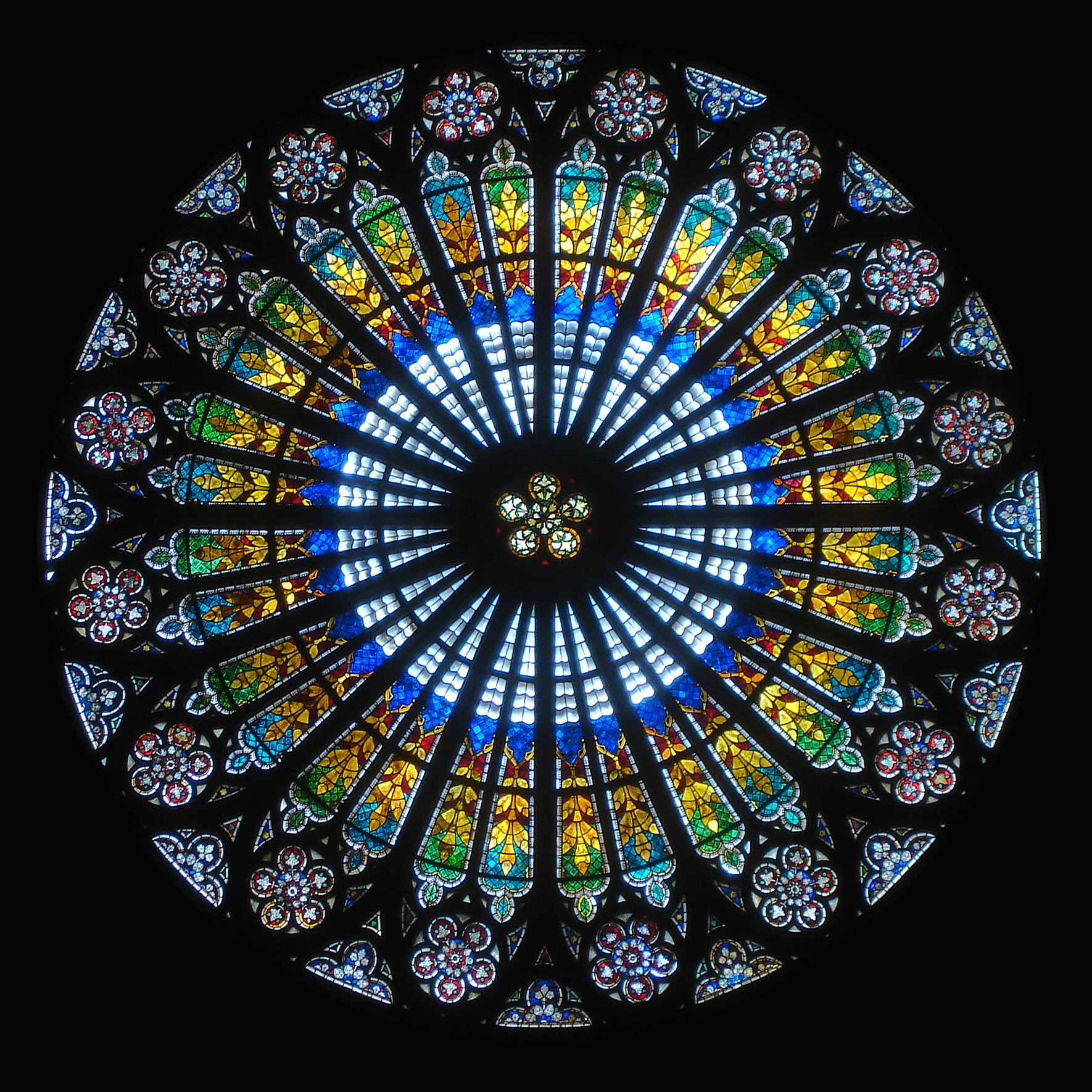 Vitraux de la rosace de la cathédrale Notre-Dame de Strasbourg.